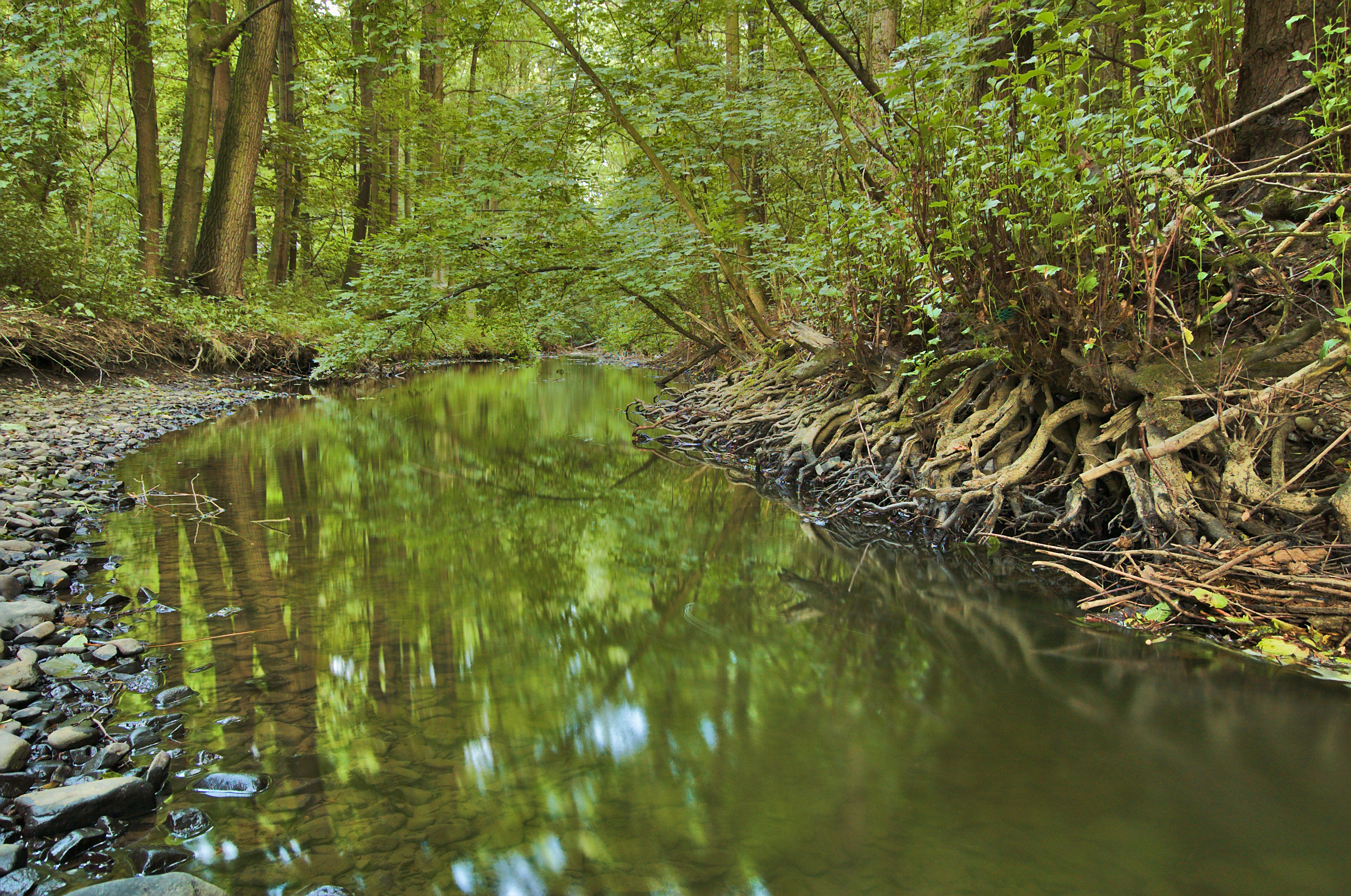 Přírodní památka Pod zápovědským kopcem, okres Prostějov